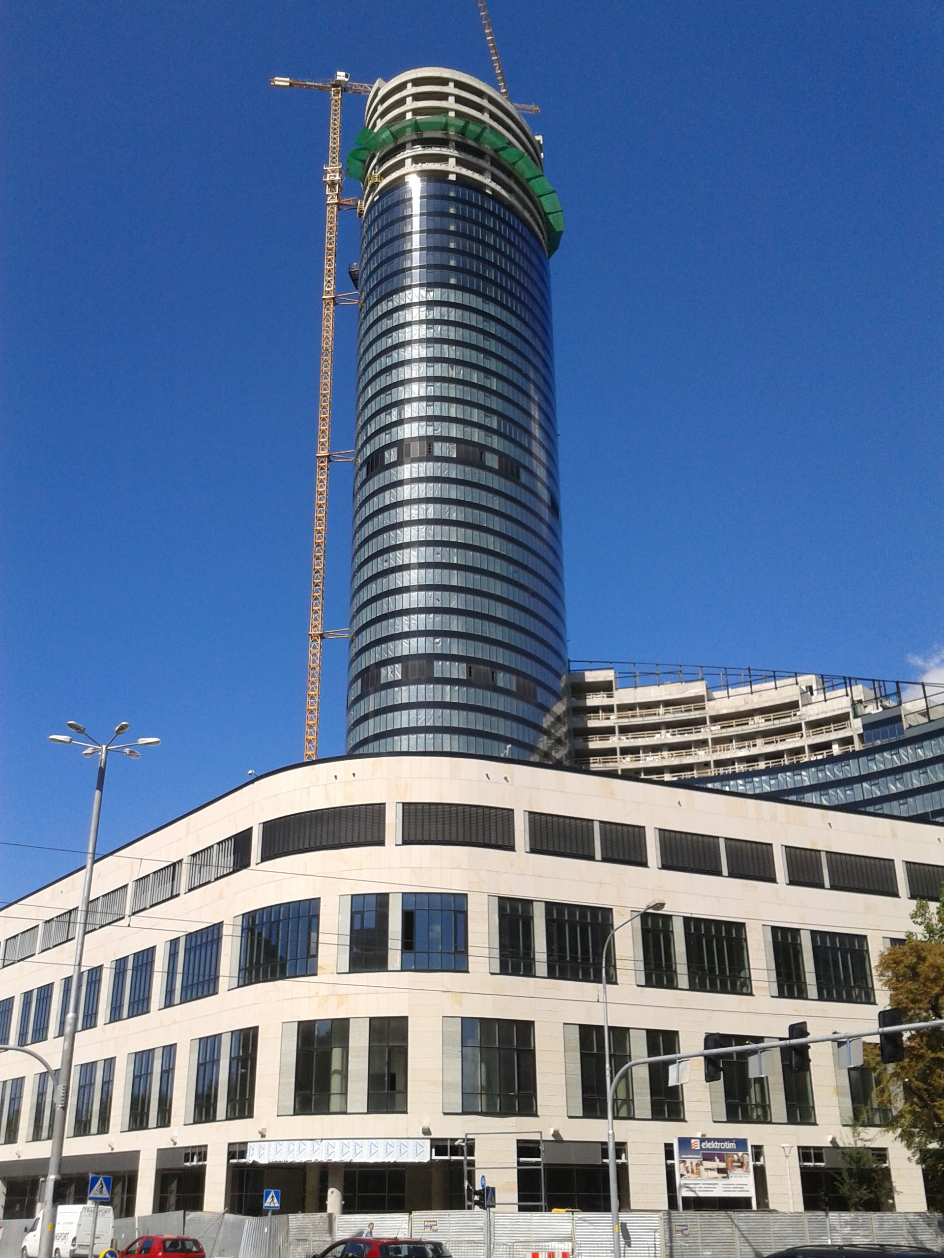 Wrocław, budowa „Sky Tower”.